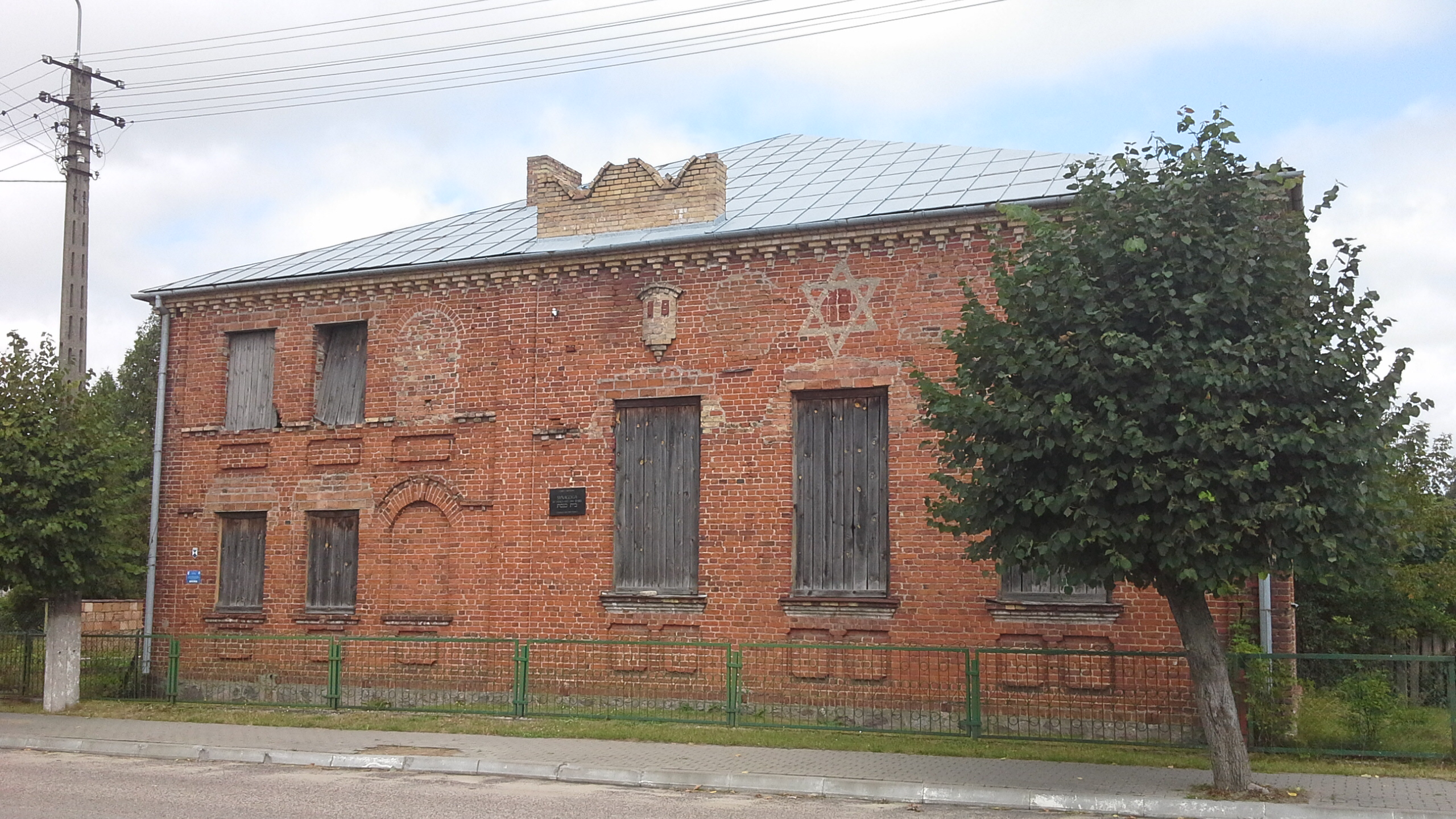 Elewacja zachodnia synagogi w Milejczycach z tablicą pamiątkową